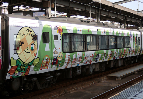 撮影:trainfan2011